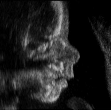 Sagittal view of a fetal face.Profil d'un embryon de 22 semaines.